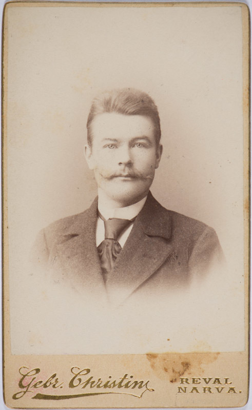 Jakob Ploompuu